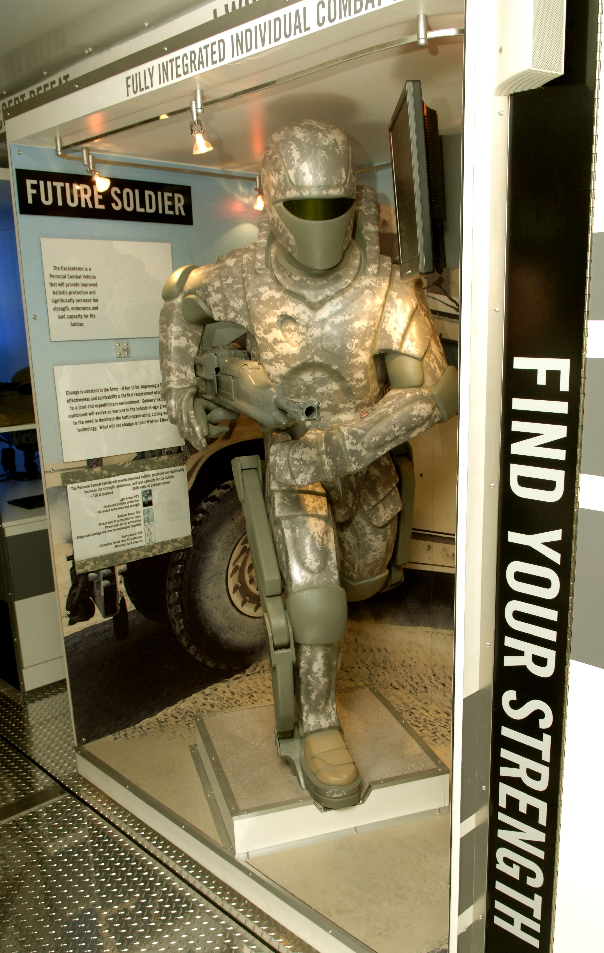 US-Army exoskeleton